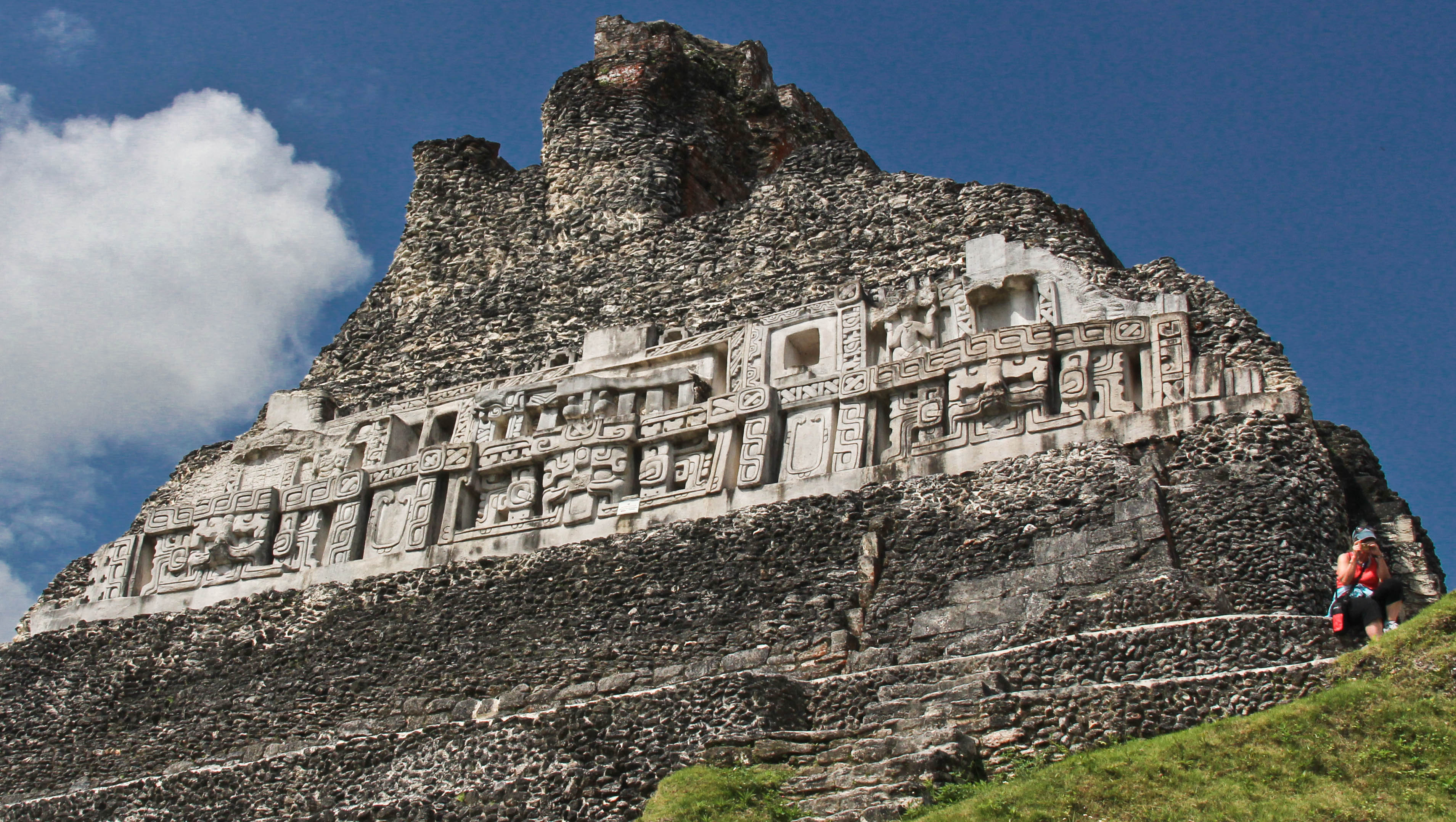 Friese, El Castillo, Xunantunich